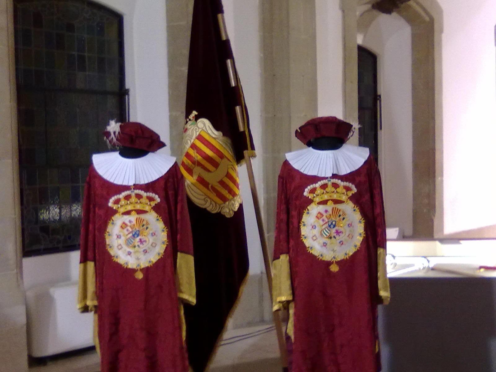 Macers i Senyera de la Ciutat. Exposició de l'Àliga 2013.